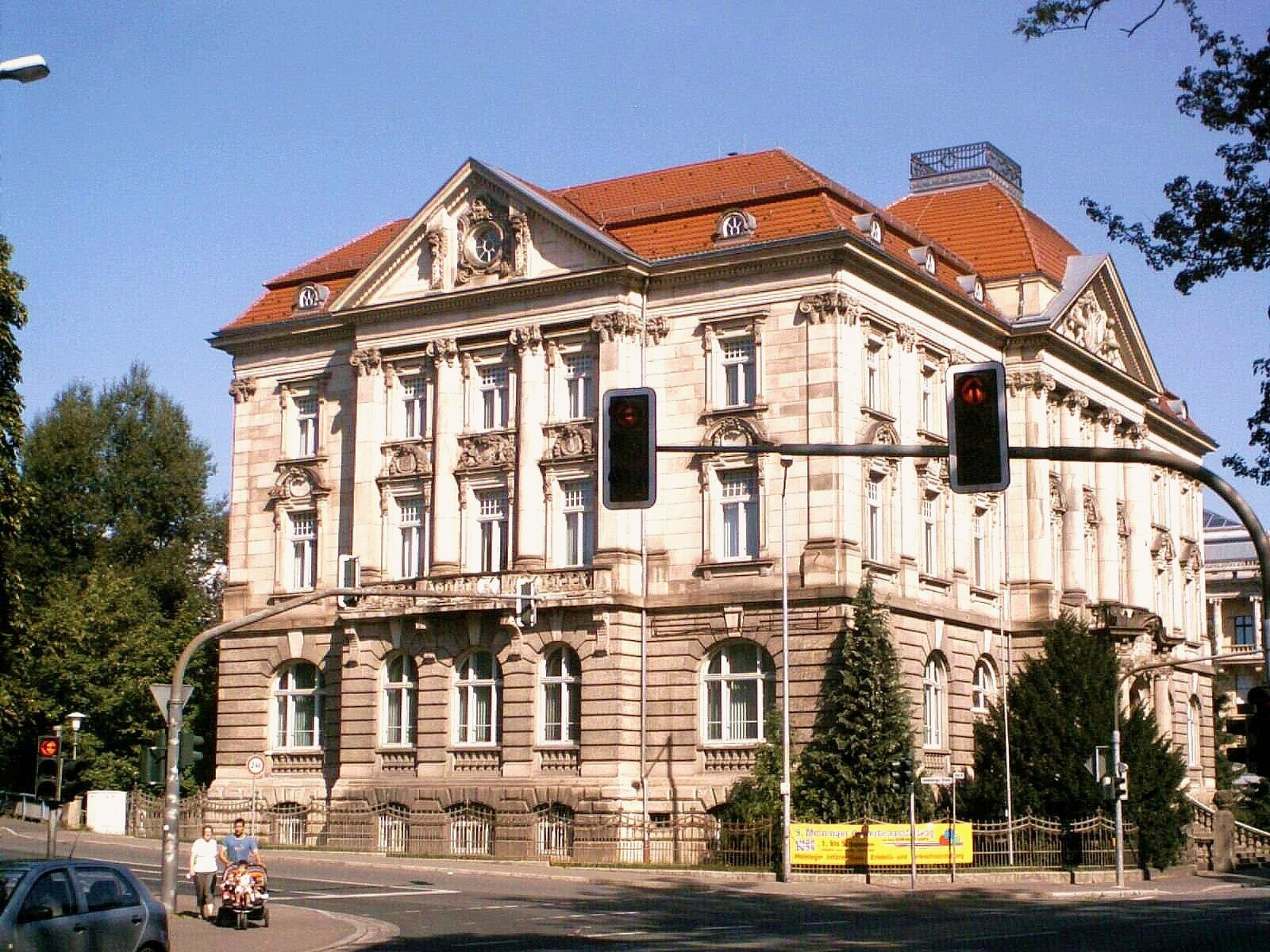 Bank für Thüringen in Meiningen, Germany